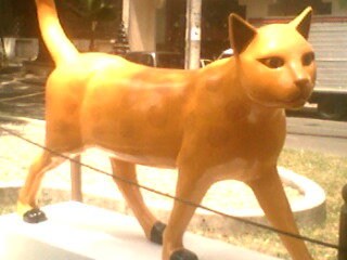 Escultura de la Gata coqueta de Maripaz Jaramillo ubicada en Calí, Colombia